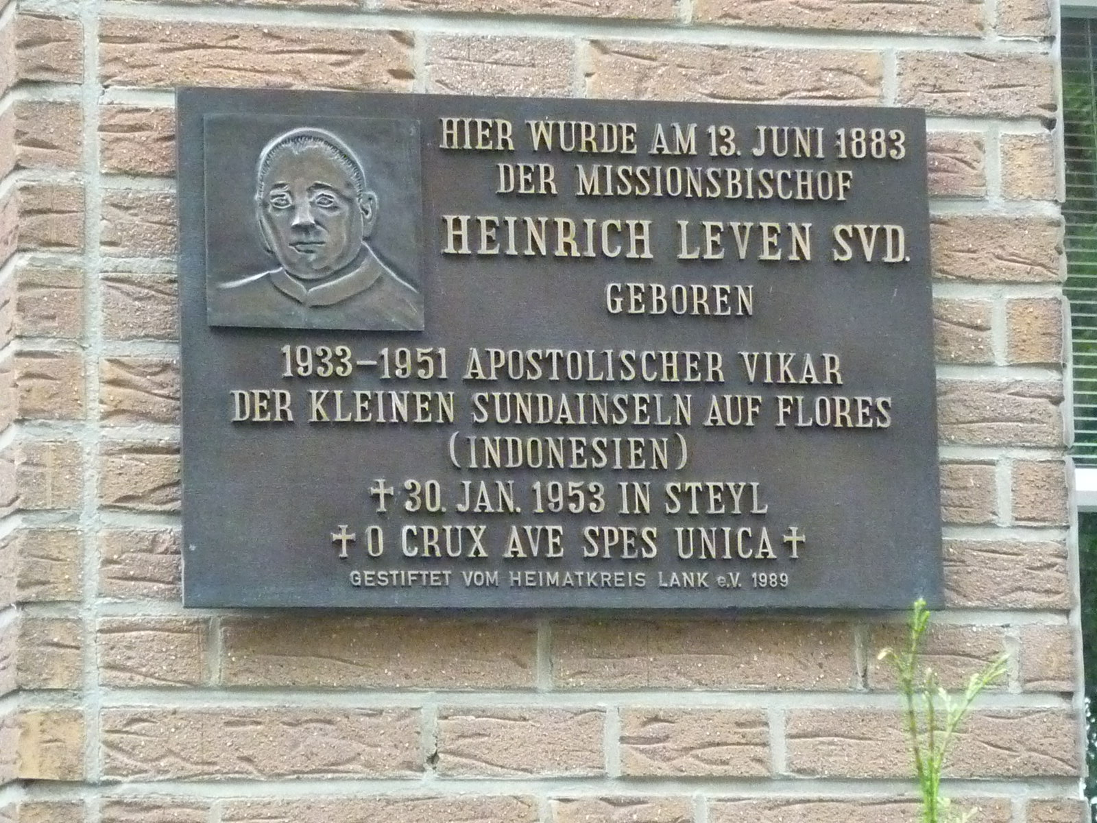 Gedenkplakette für Heinrich Leven an dessen Geburtshaus in Meerbusch-Lank-Latum; Portrait Motiv angefertigt für den Heimatkreis Lank e.V. 1989 von Odile Christiane Salms